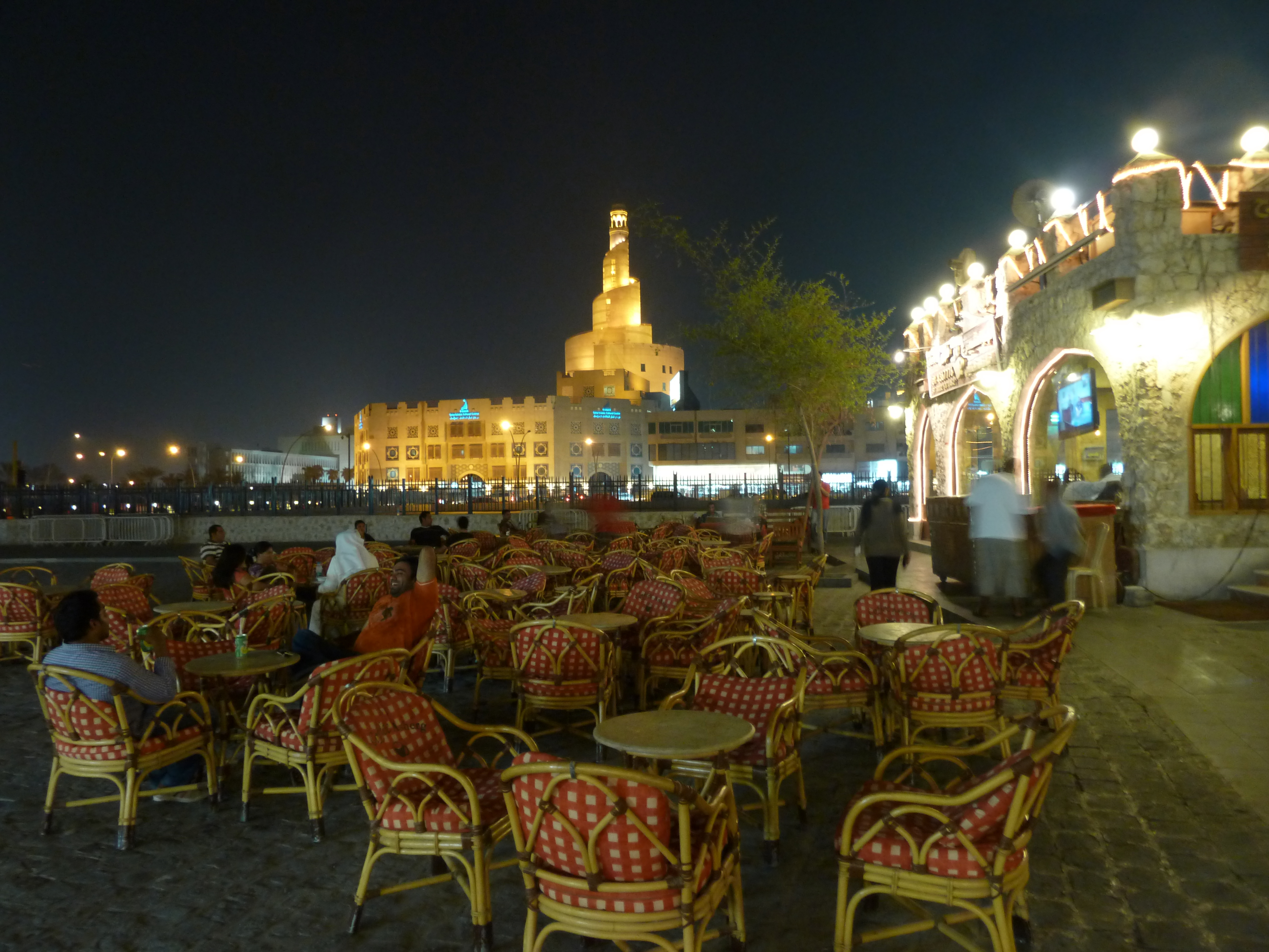 Doha, Qatar.